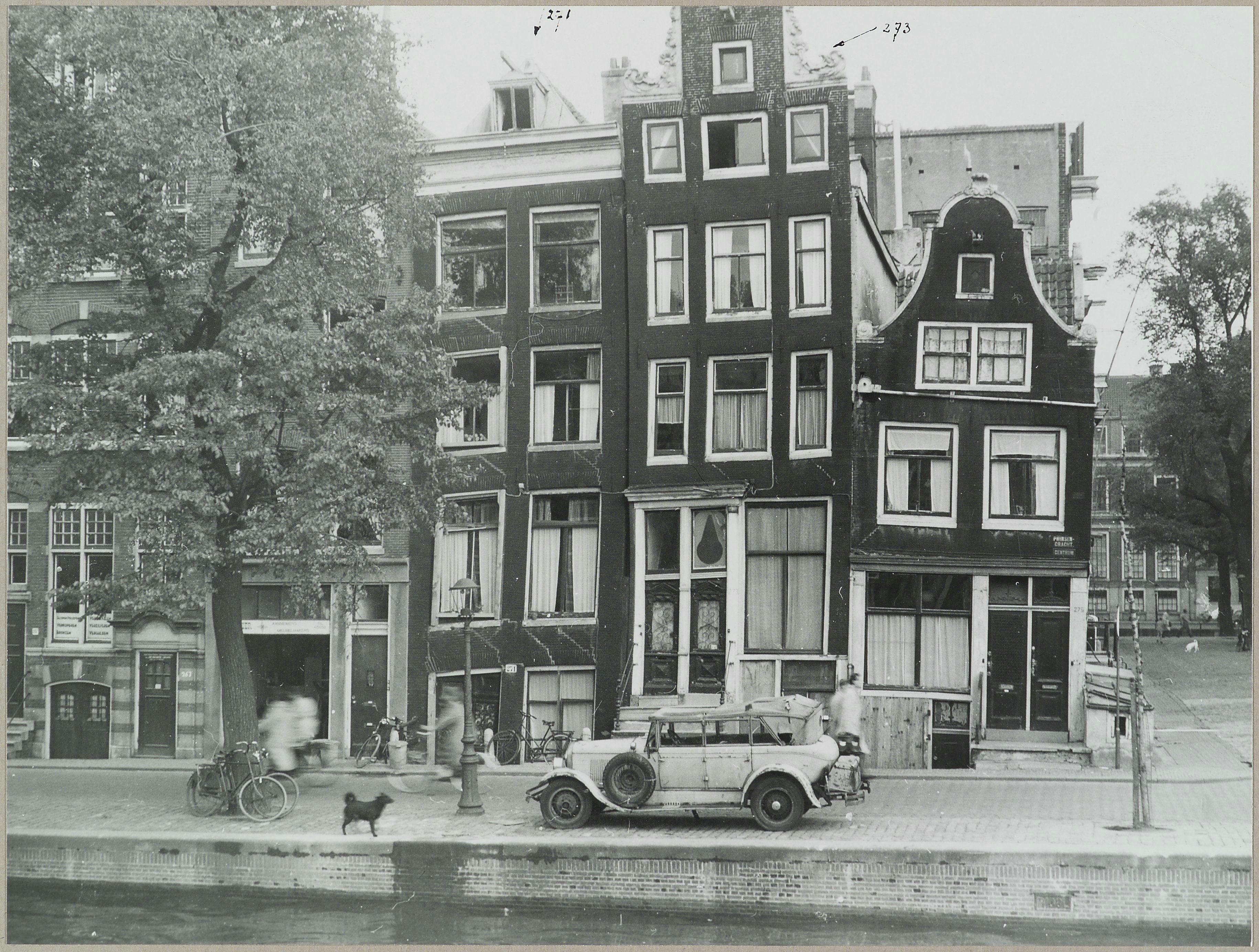 Gevelwand/ Grachtenhuis: Zicht op gevelwand aan gracht en deel plein